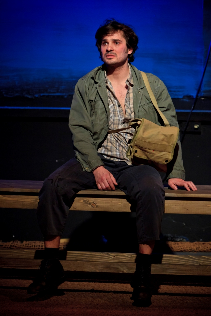 בין שחר לבין לילה 2012 דניאל צ'רניש (1)